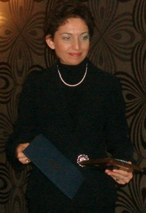 Orkestra şefi İnci Özdil, 2010